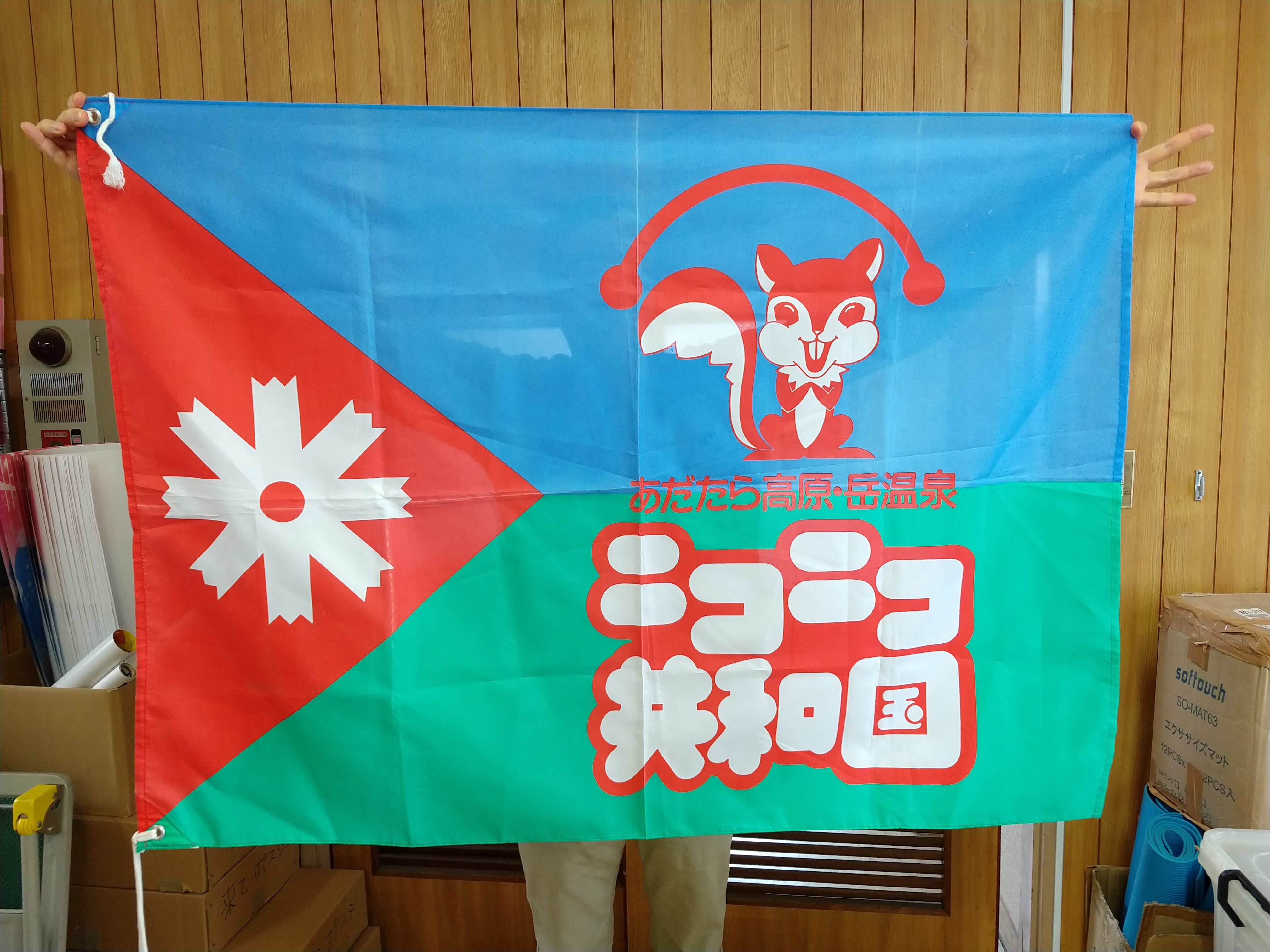 ニコニコ共和国に関する写真